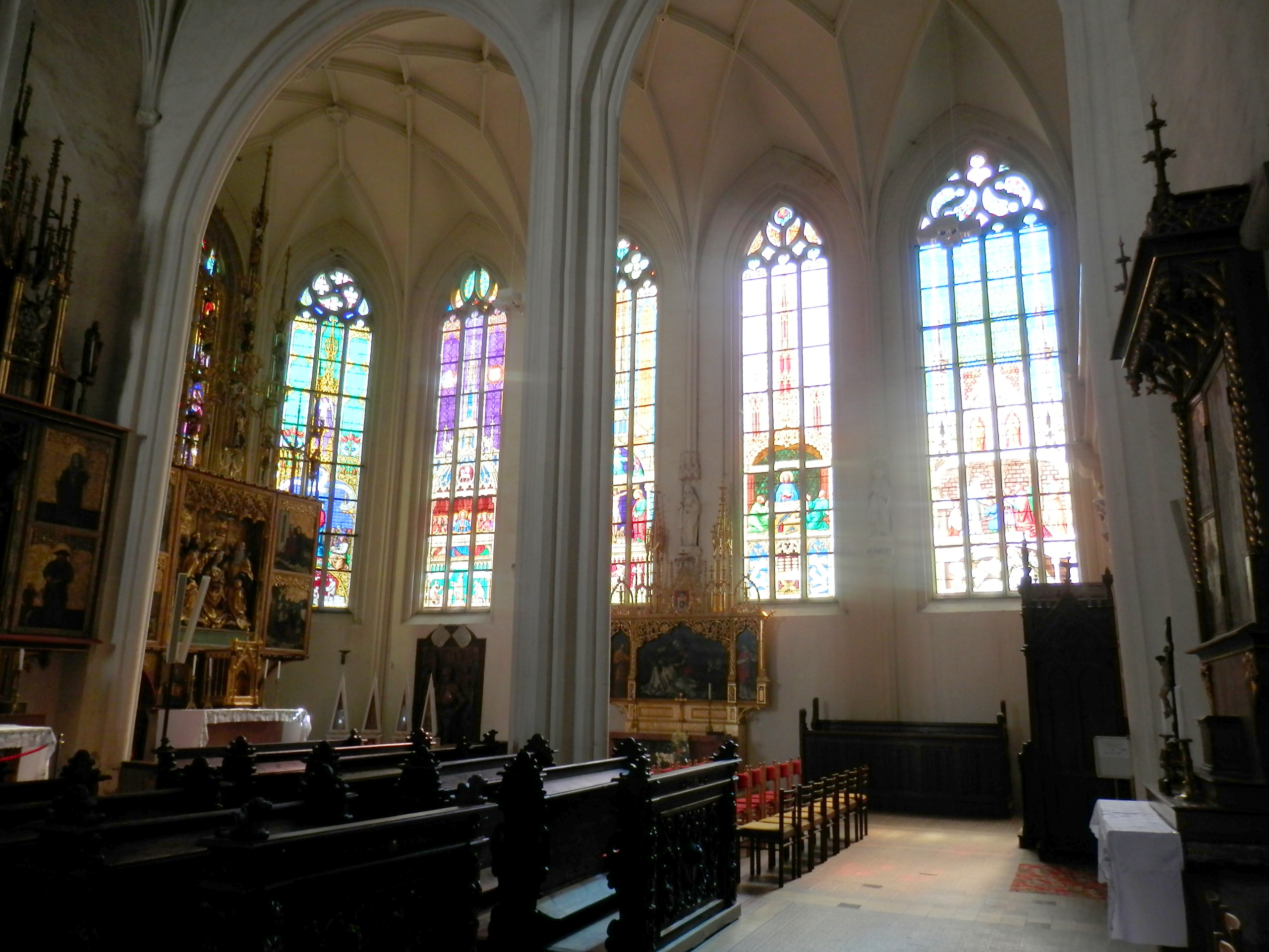 Interiér. Katedrála svätého Martina, Spišská Kapitula - Spišské Podhradie. Založená v roku 1200. Okres Levoča.